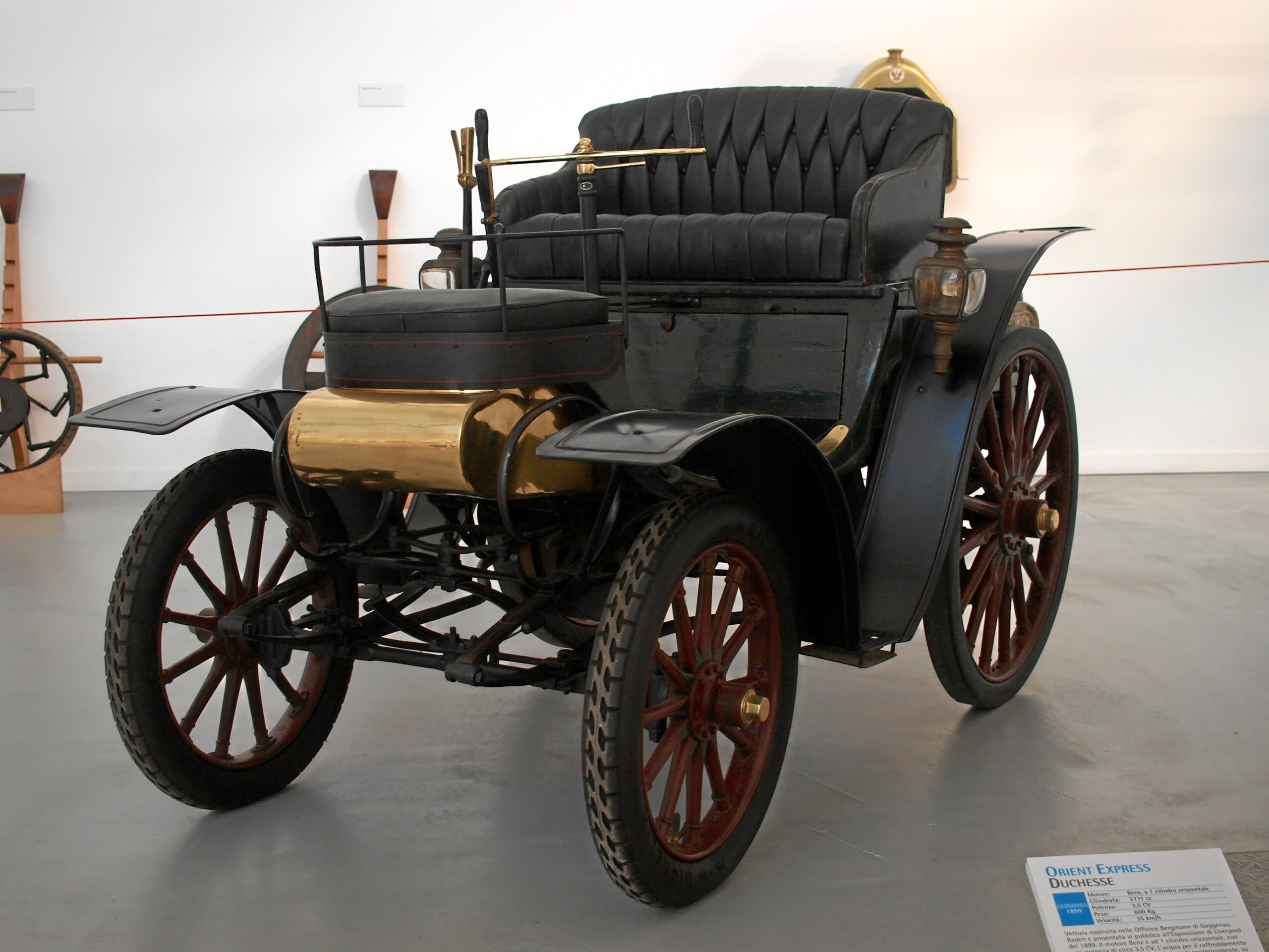 L'Evoluzione dell'automobile Orient Express. "Bergmanns Industriewerke" at Gaggenau (Baden)